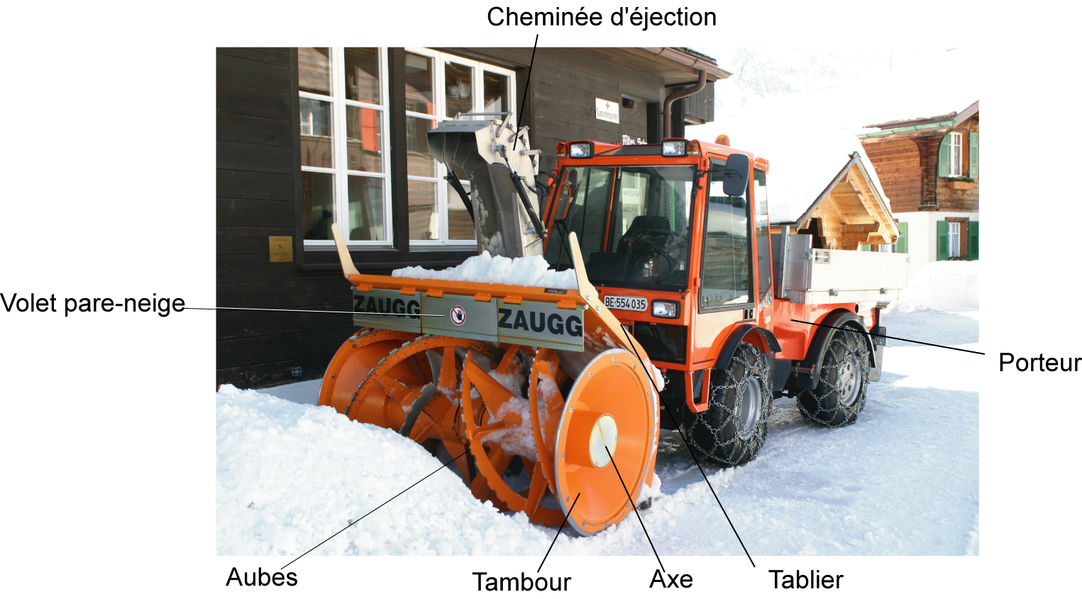 Eléments constituant une fraise (outil de déneigement)